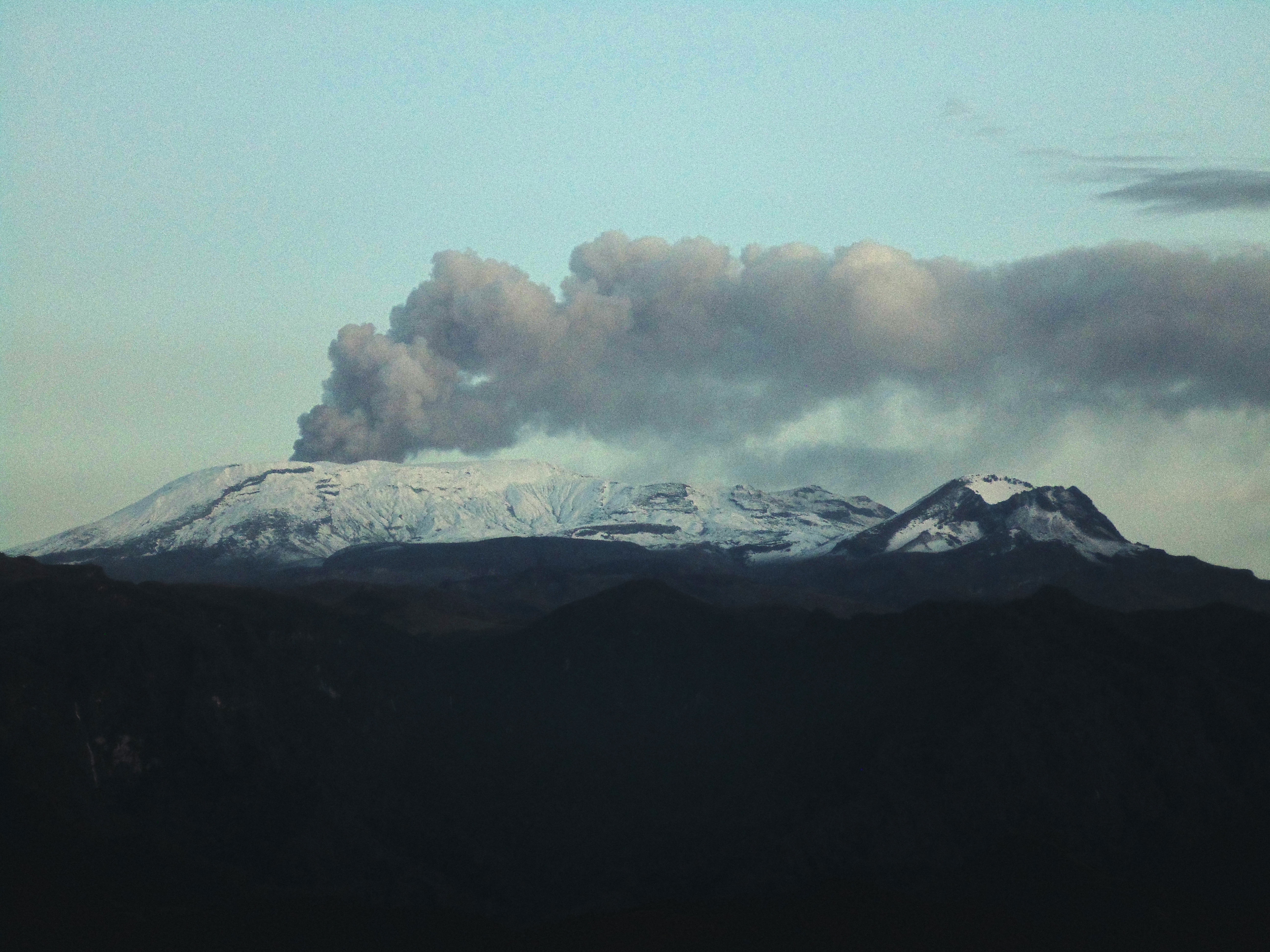 Ubicación: MANIZALES, CALDAS